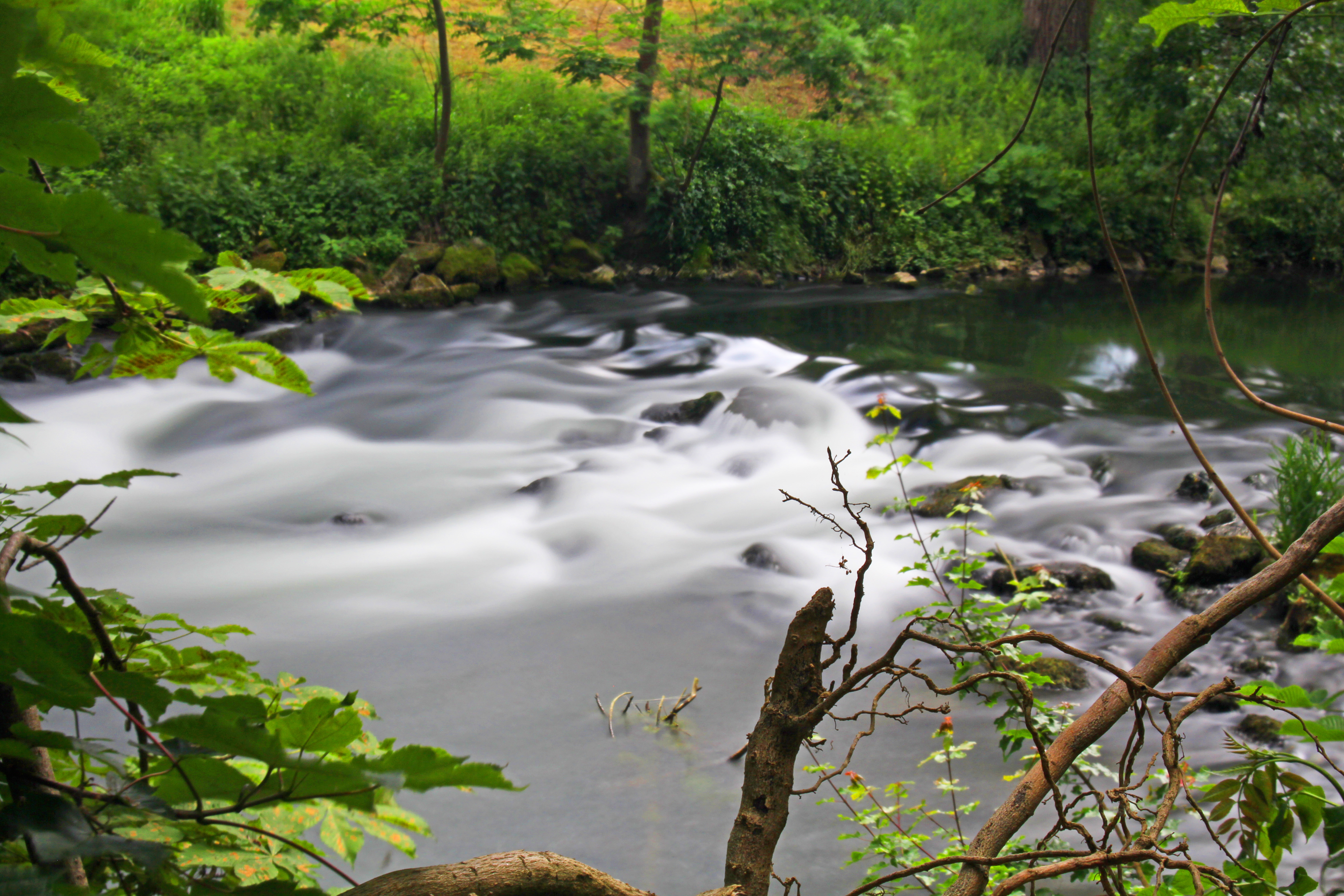 Kurz bevor die Brenz in die Donau bei Lauingen mündet, passiert sie eine Stromschnelle.